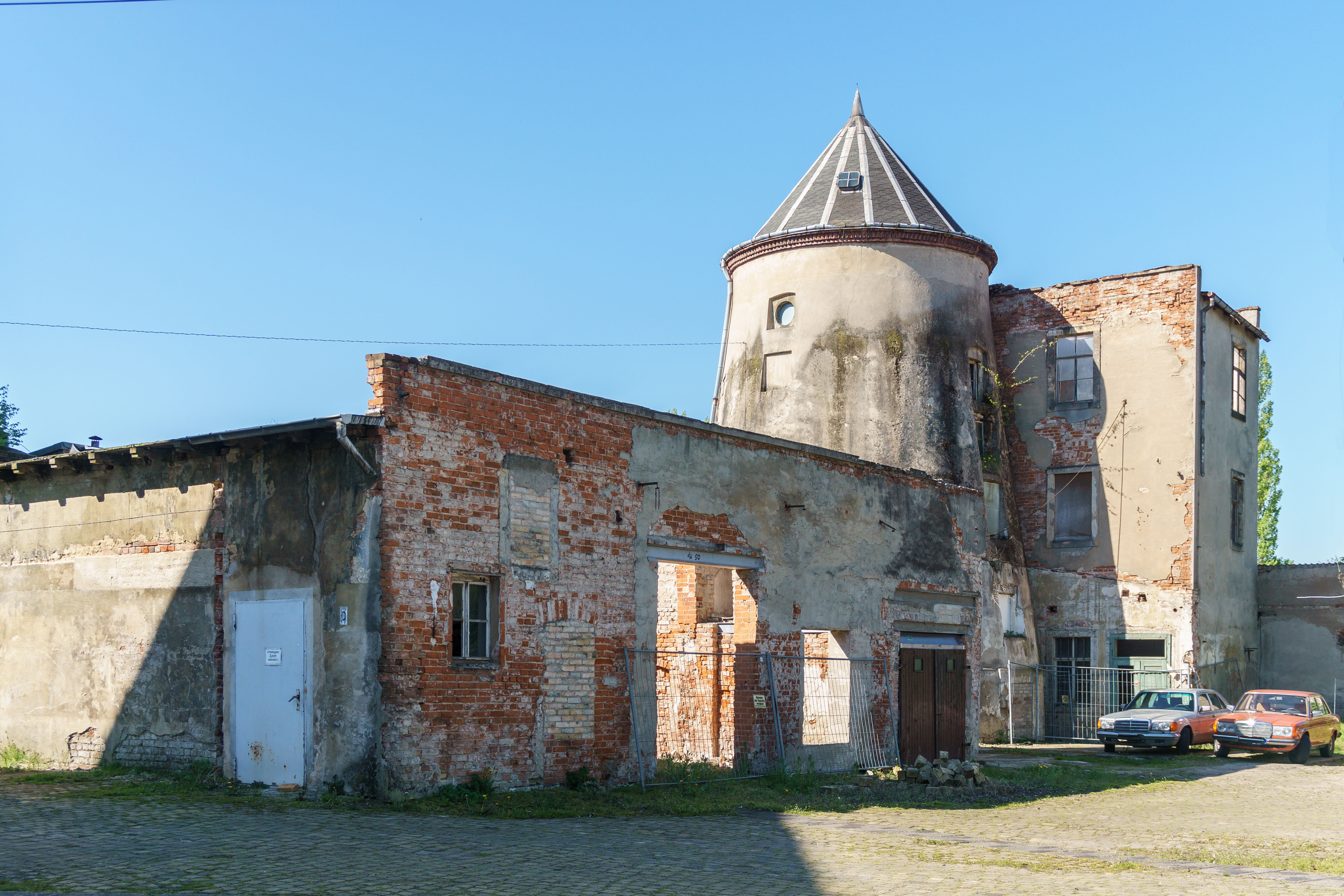 Ehemalige Turmholländer-Windmühle, Kötzschenbroder Straße 9 in Dresden-Mickten